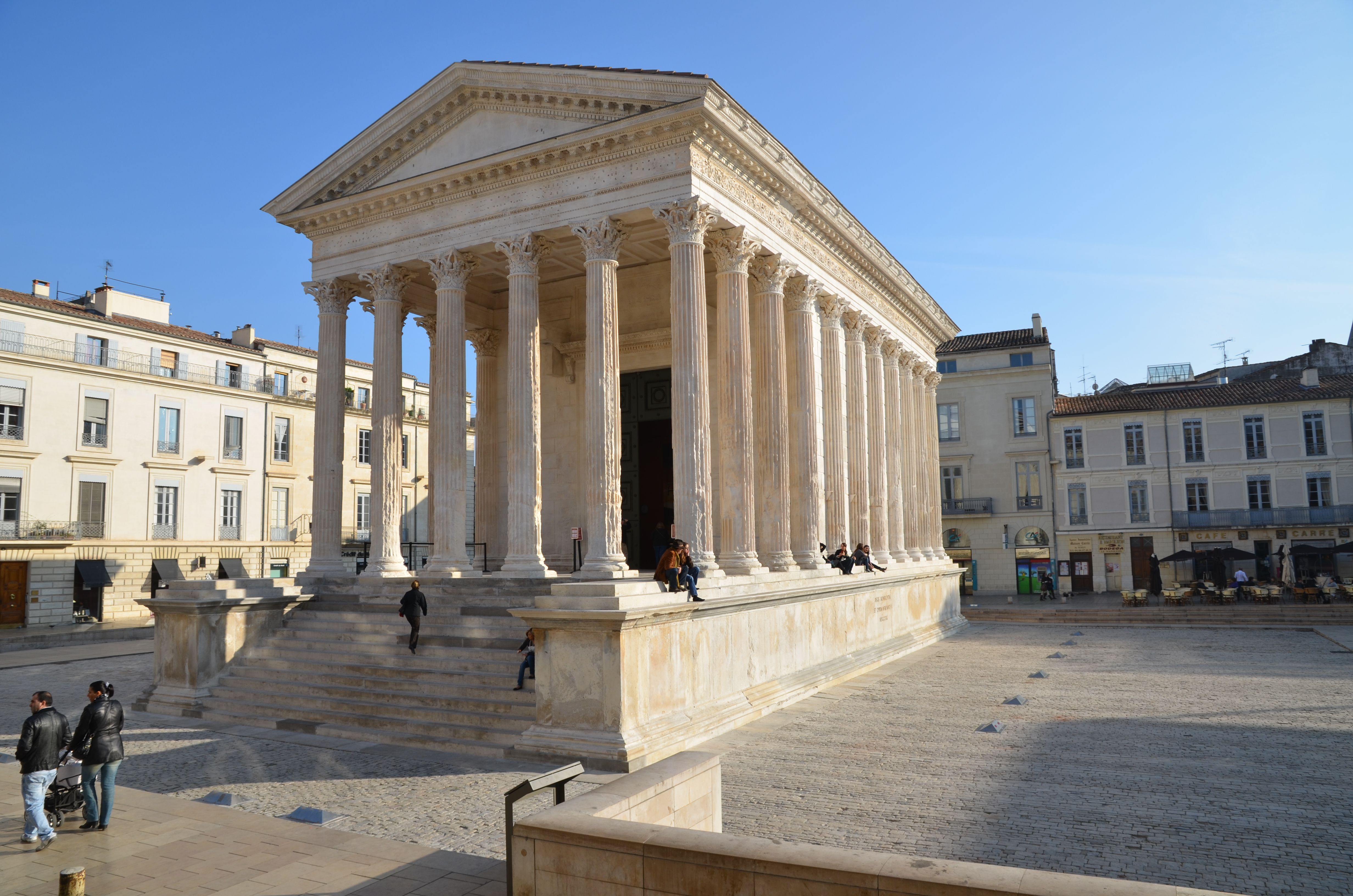 Maison Carrée à Nîmes (Gard) - France